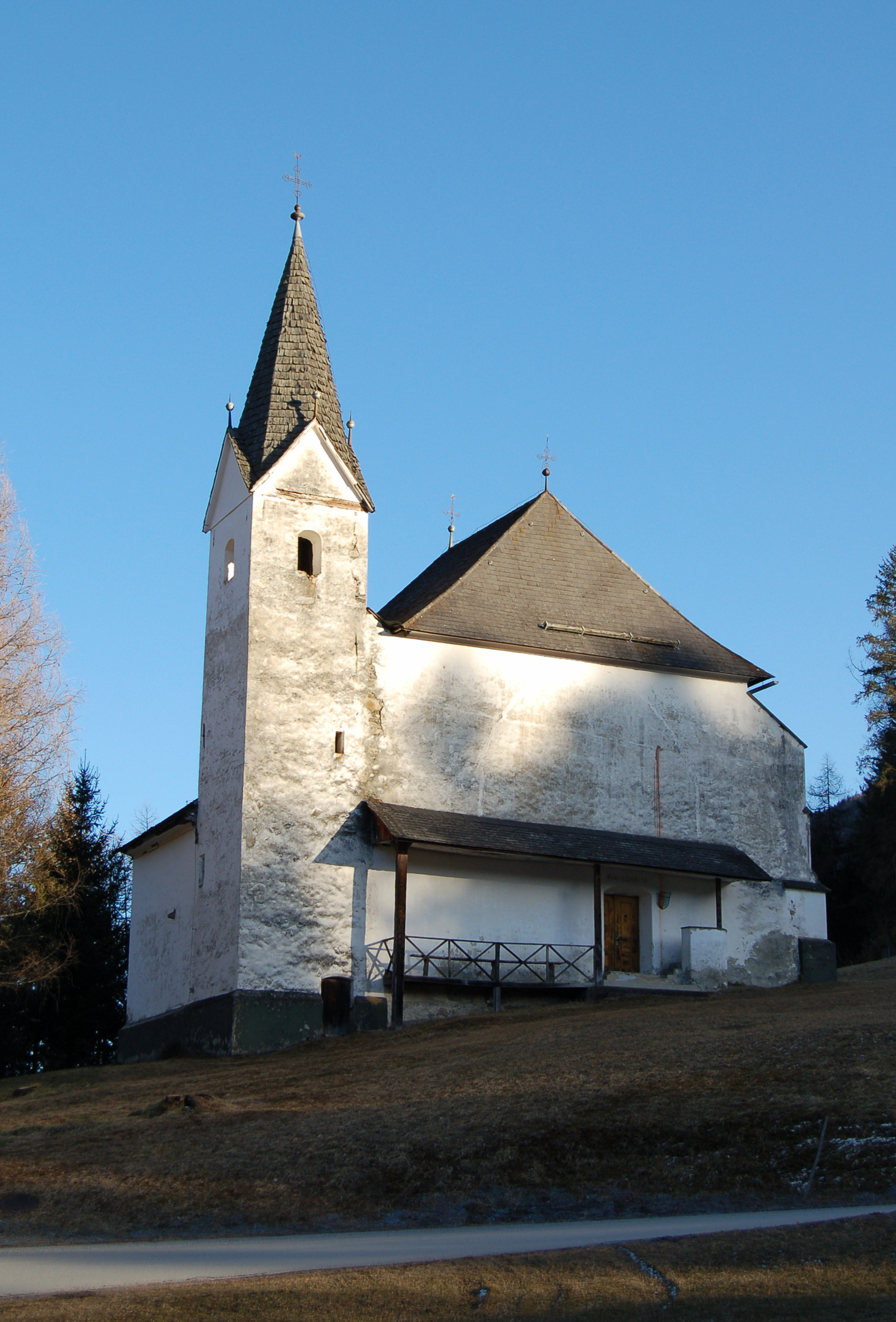 Pankraziuskirche, spätgotisches Bergkirchlein, erbaut um 1490 (laut Inschrift), südwestlich von Oberwölz in der Steiermark